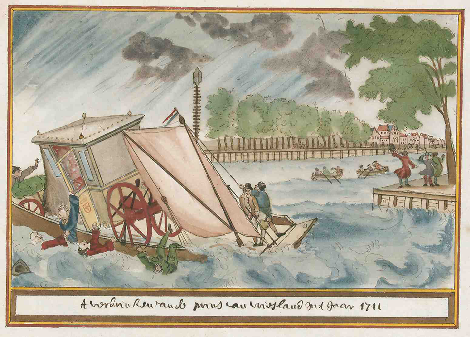 Korte Beschreijving van de Steden Dorpen Gehugten en Heeren-huizen der Heerlykheid Vriesland Benevens Desselfs Afbeeldingen Meest na 't leven getekent By een Vergaderdt Door Andries Schoemaker